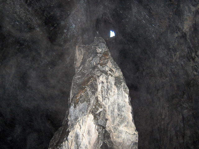 Inne i hula står en 6 m høg, spiss stein som minner om en stor bauta